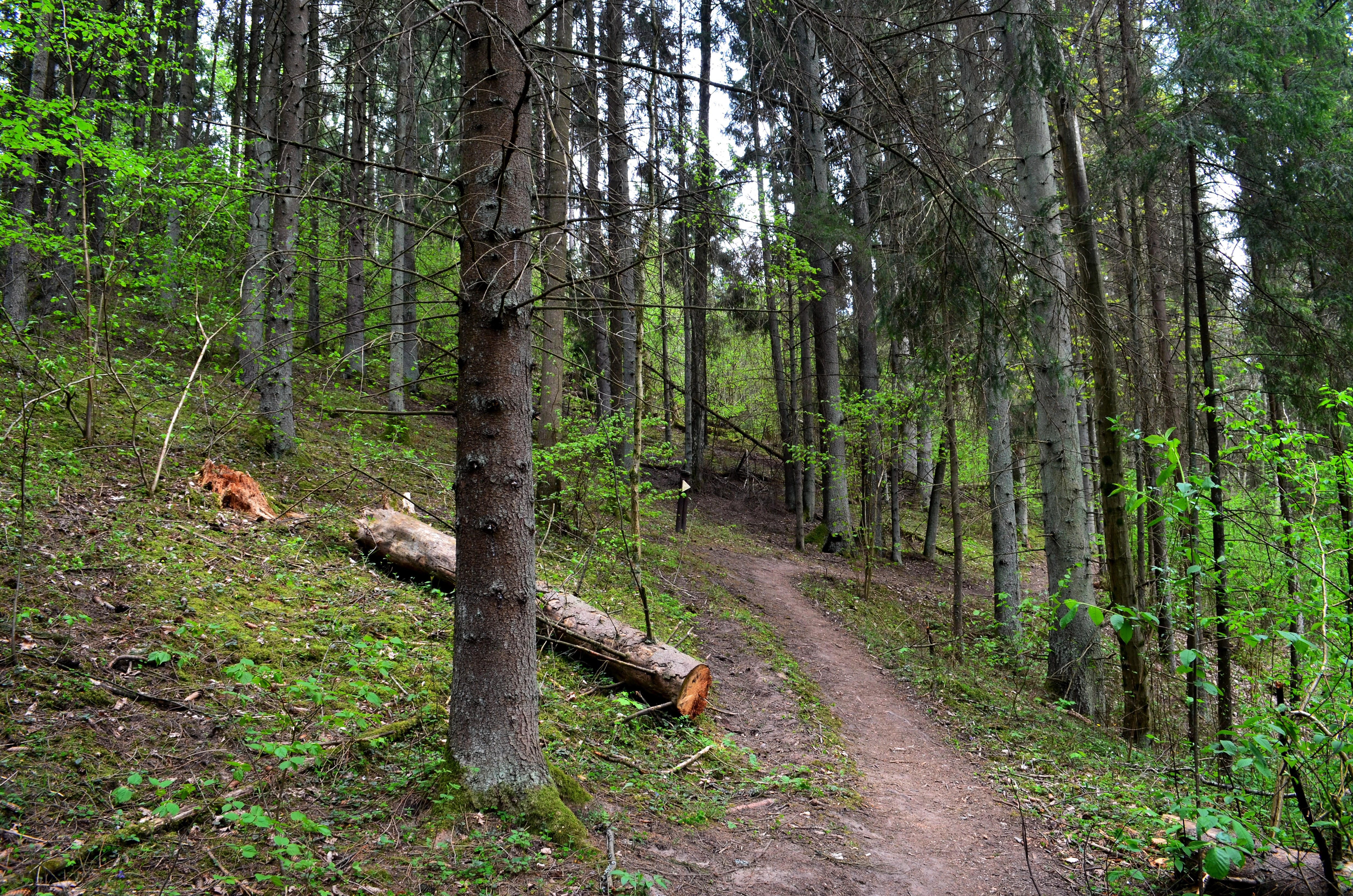 Plokščių piliakalnis, Šakių raj.